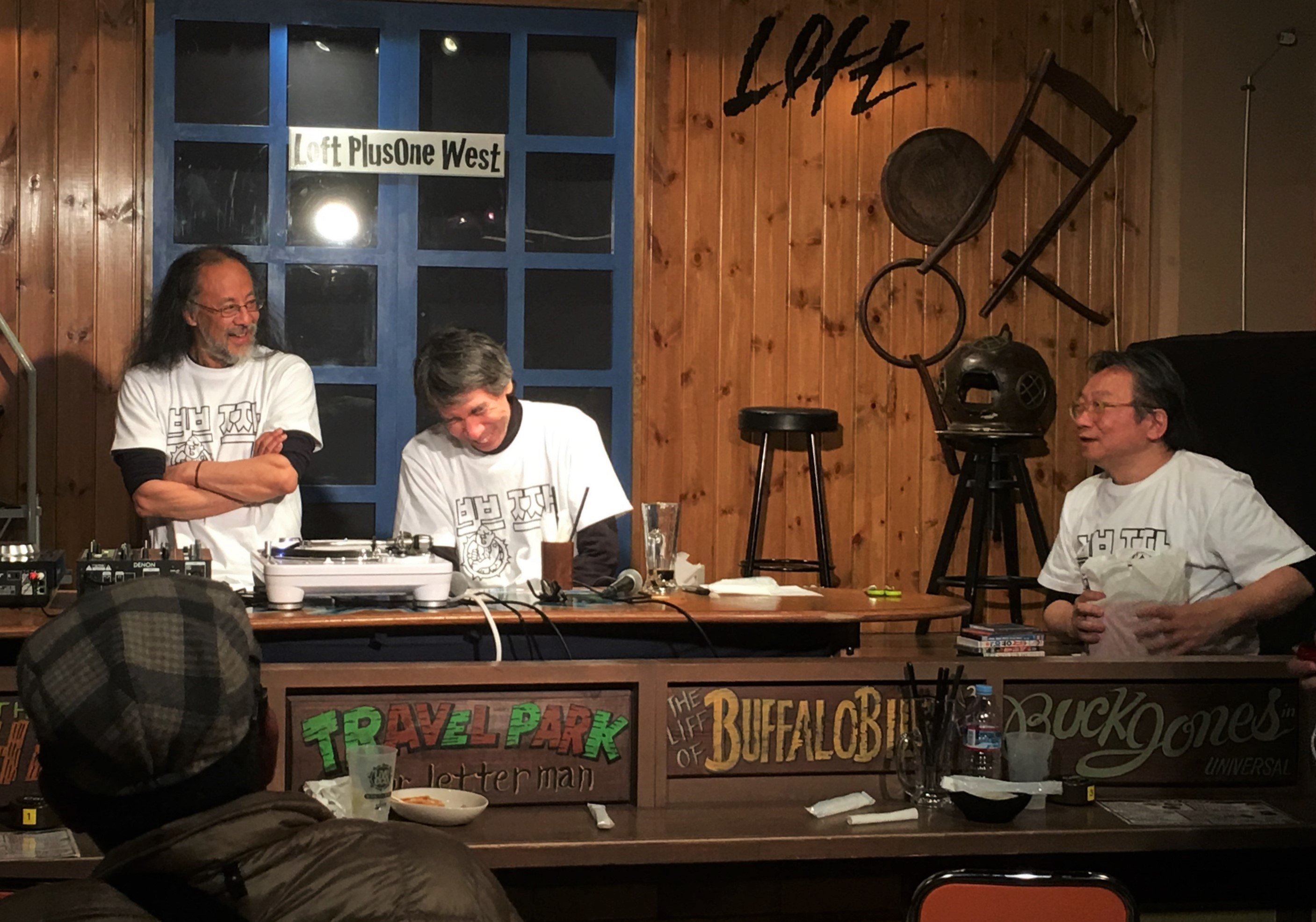 2017年3月26日撮影幻の名盤解放同盟結成35周年イベント「夜、因果の夜」